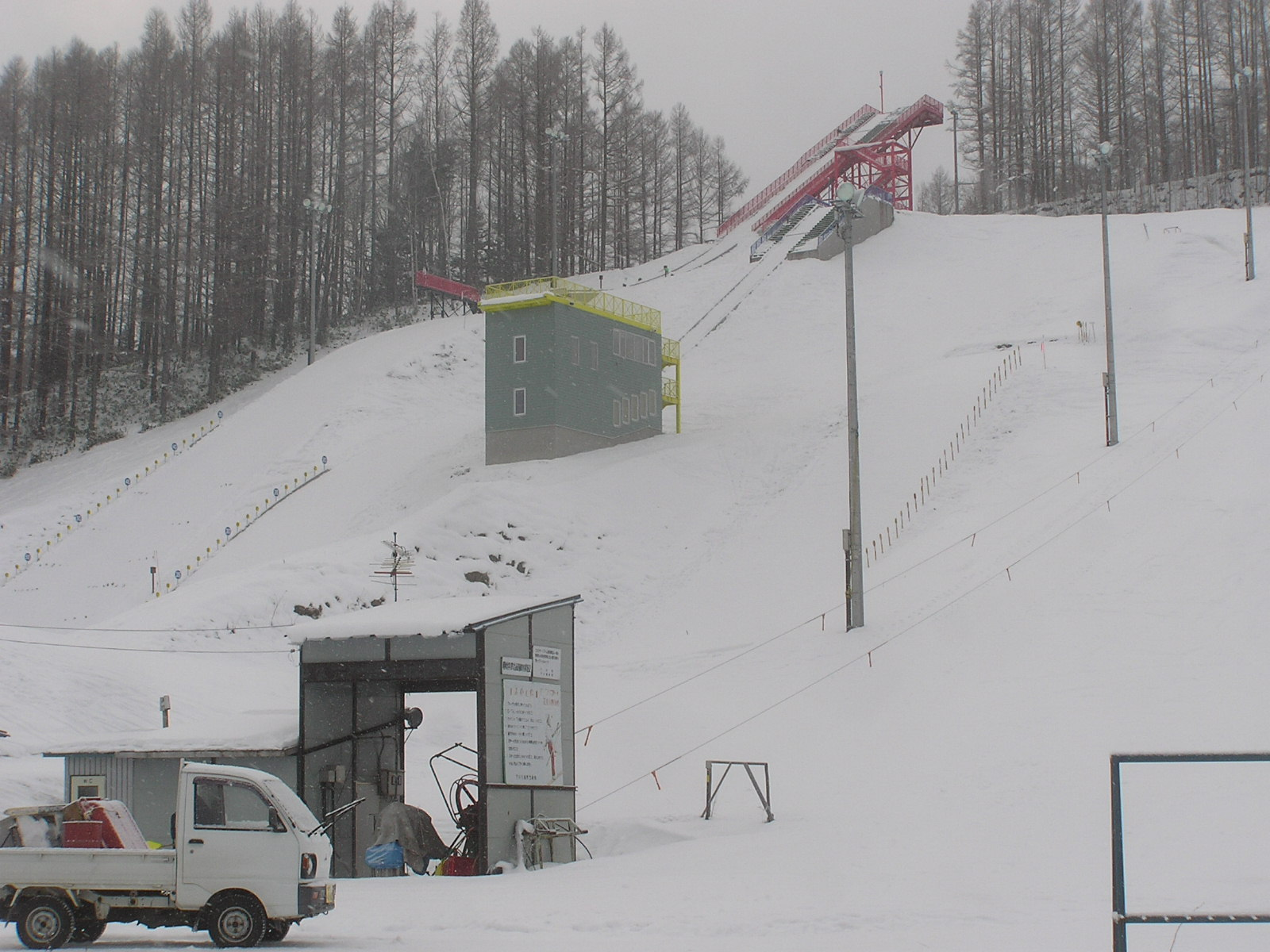 下川シャンツェ